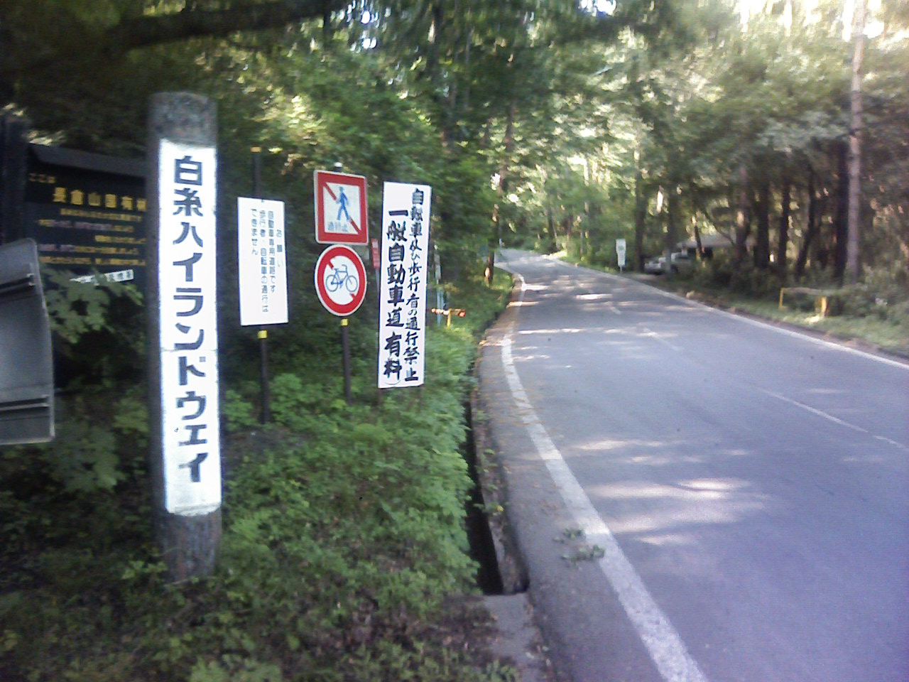 白糸ハイランドウェイ（旧三笠ホテル側入口。長野県北佐久郡軽井沢町）